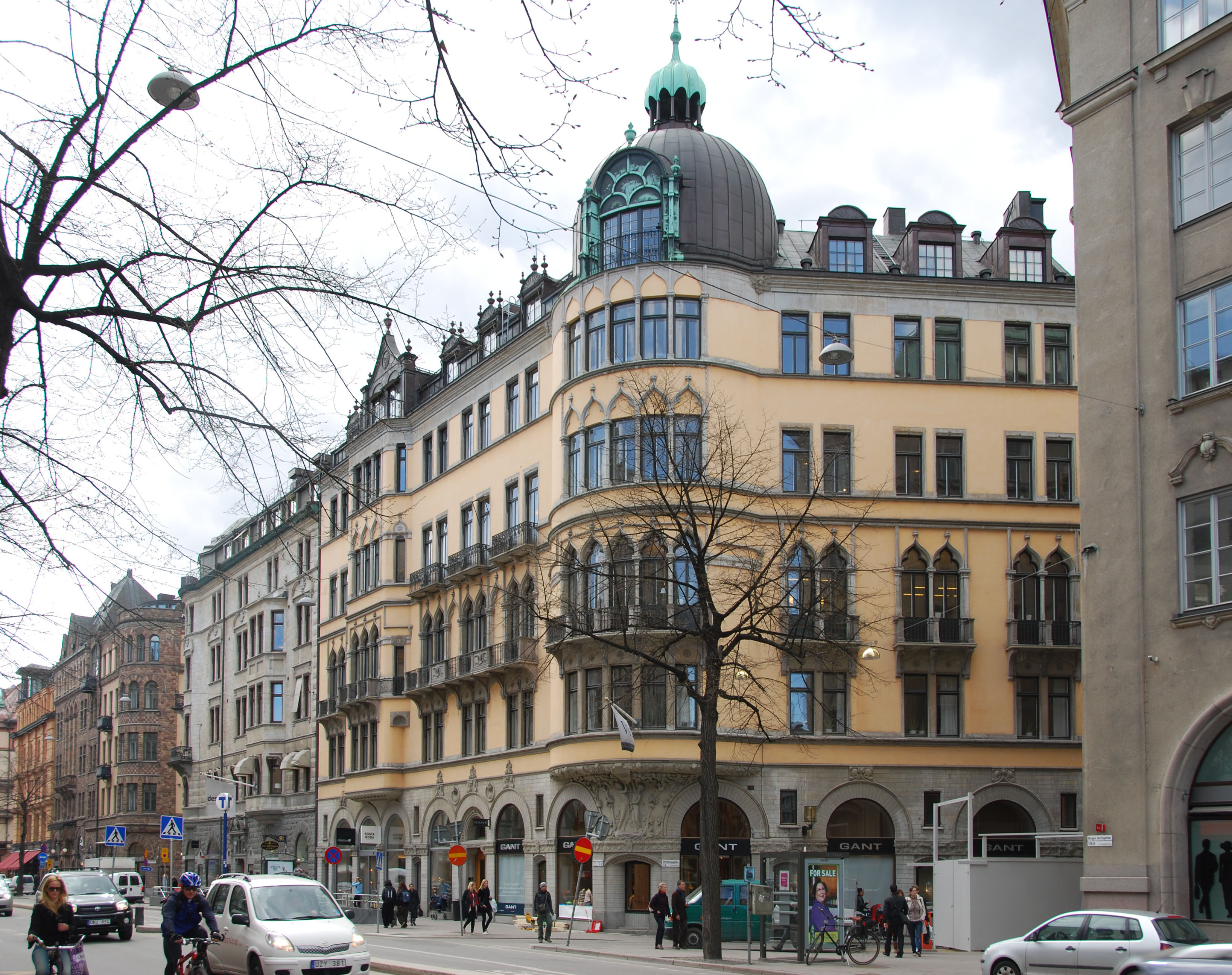 Birger Jarlsgatan 15, Stockholm. Byggt 1898-1900.